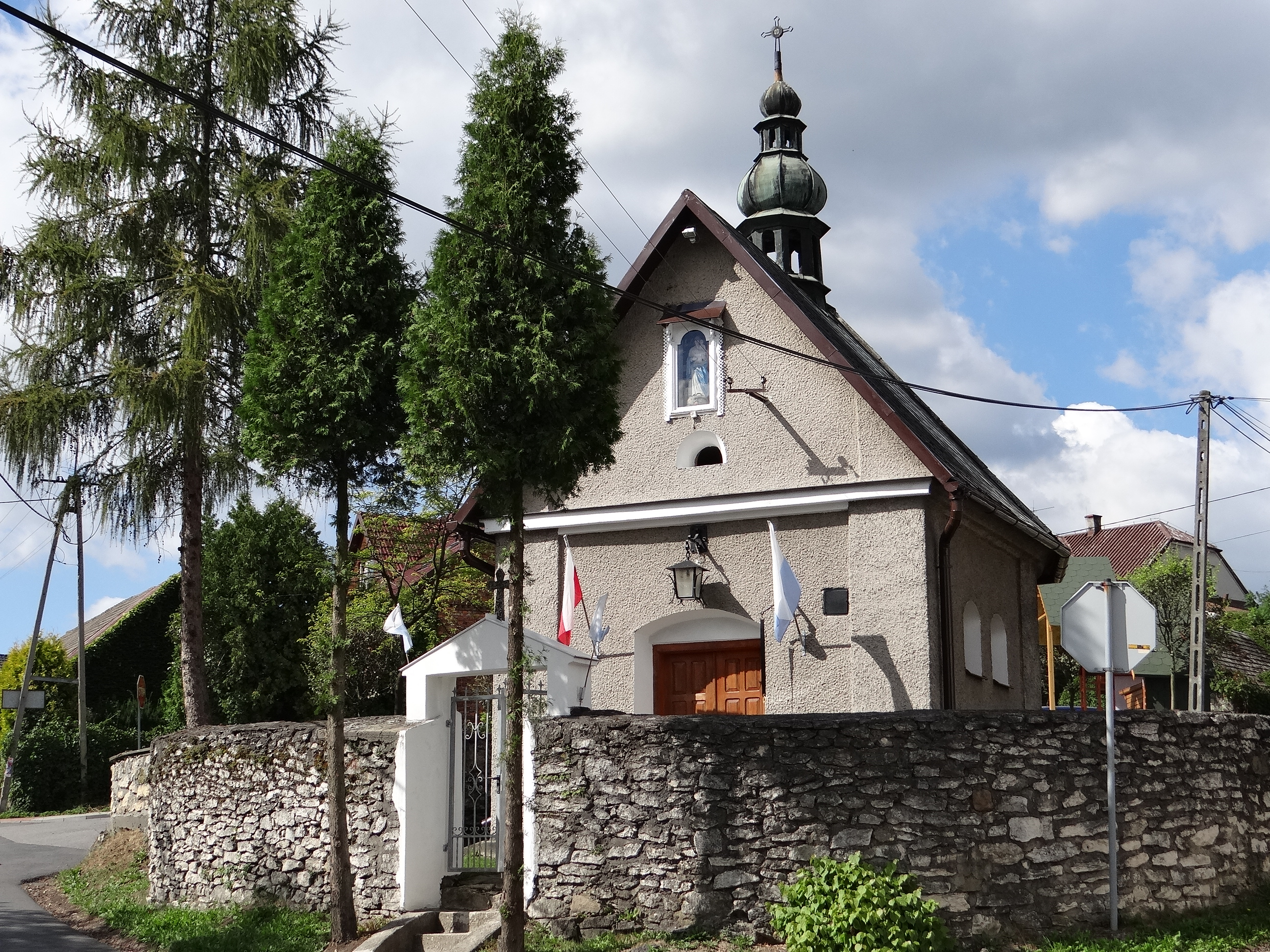 Czułów, kaplica pw. Matki Boskiej, 1869